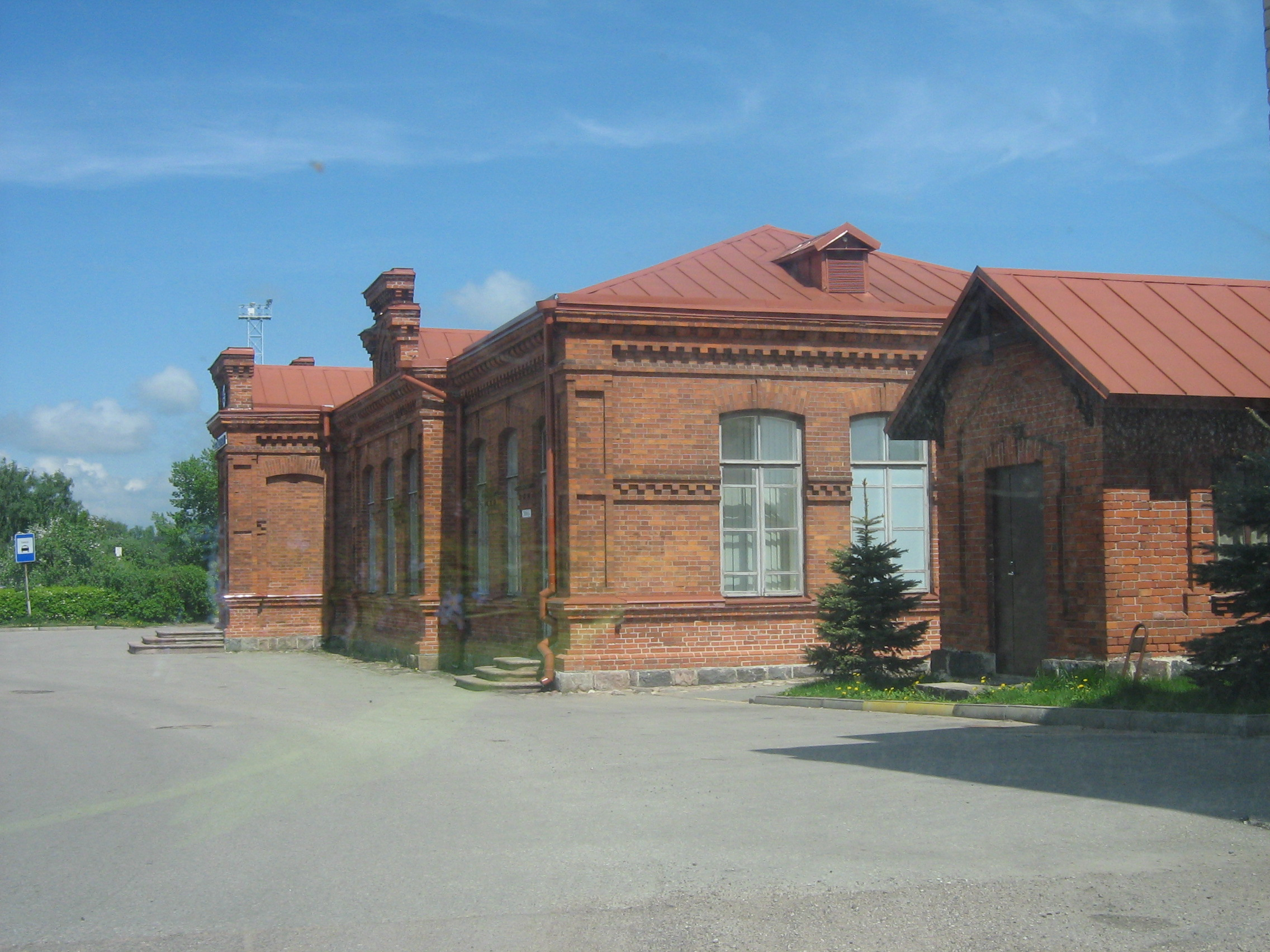 Jonavos traukinių stotis